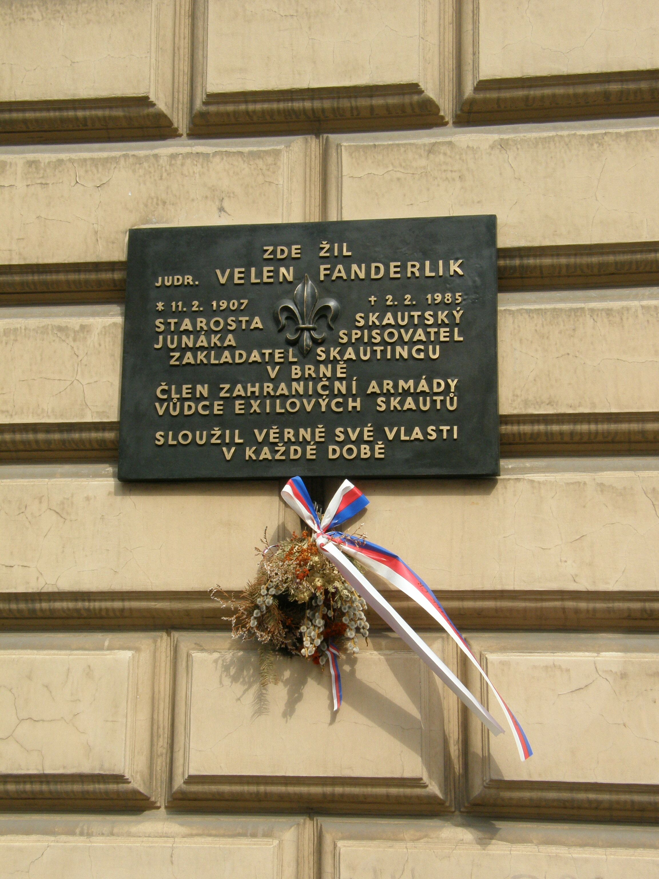 Pametni deska na pamatku Velena Fanderlika (Silingrovo namesti, Brno)